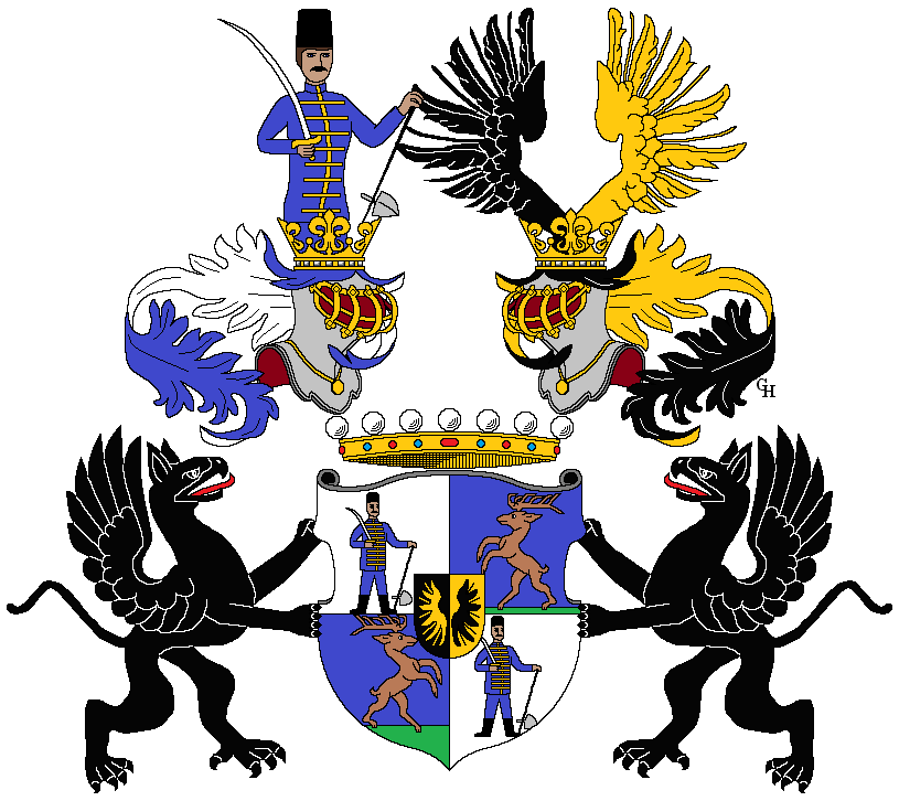 Wappen des österreichisch-ungarischen Offiziers Arnold Freiherrn von Conrad-Hauer, verliehen 1914 anlässlich der Übertragung des Namens und Wappens von seinem Schwieger- und Adoptivvater, dem Feldmarschallleutnant Leopold Freiherrn von Hauer (1854–1933). Zeichnung von Gerd Hruška ( Für weitere Informationen zu dieser Standeserhebung siehe Arno Kerschbaumer, Nobilitierungen unter der Regentschaft Kaiser Franz Joseph I. / I. Ferenc József király (1914–1916), Graz 2017 (ISBN 978-3-9504153-2-2), S. 84, 141, 143 sowie (